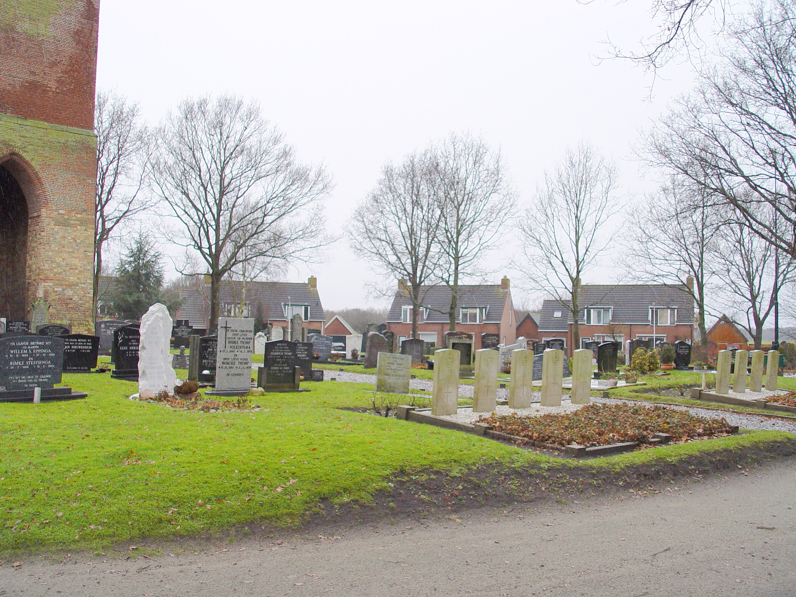 Overzicht van het erehof Nijemirdum in het Zuiden van Friesland